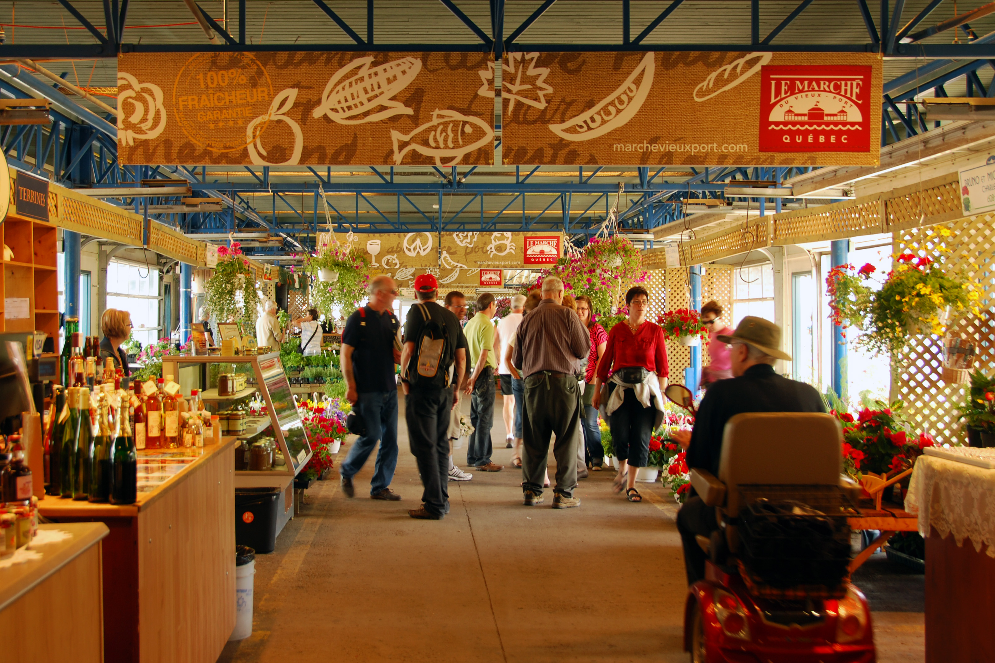 Marché du Vieux Port de Québec (allée intérieure 2)